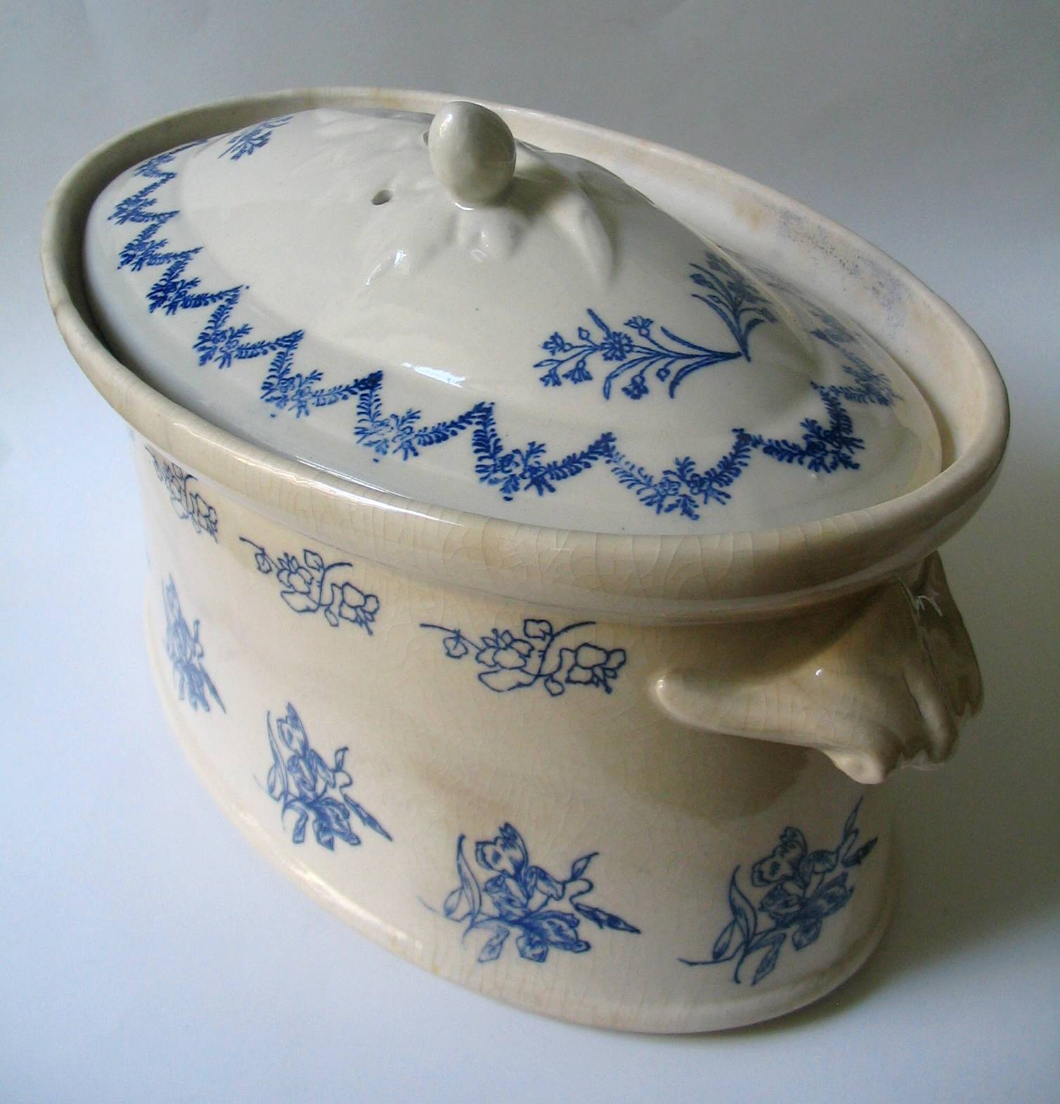 Terrine en grès, Saint-Uze, France, vers 1900. manufacture Revol